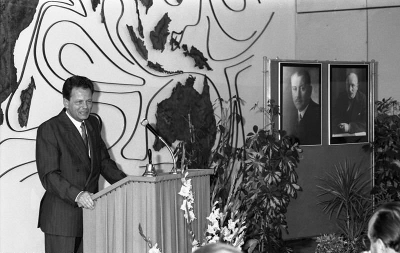 18.9.1987 Gedenkstunde anläßlich der Todestage zweier ehemaliger Staatssekretäre des Auswärtigen Amtes: Ago Freiherr von Maltzahn (60. Todestag) und Carl von Schubert (40. Todestag) im Auswärtigen Amt.